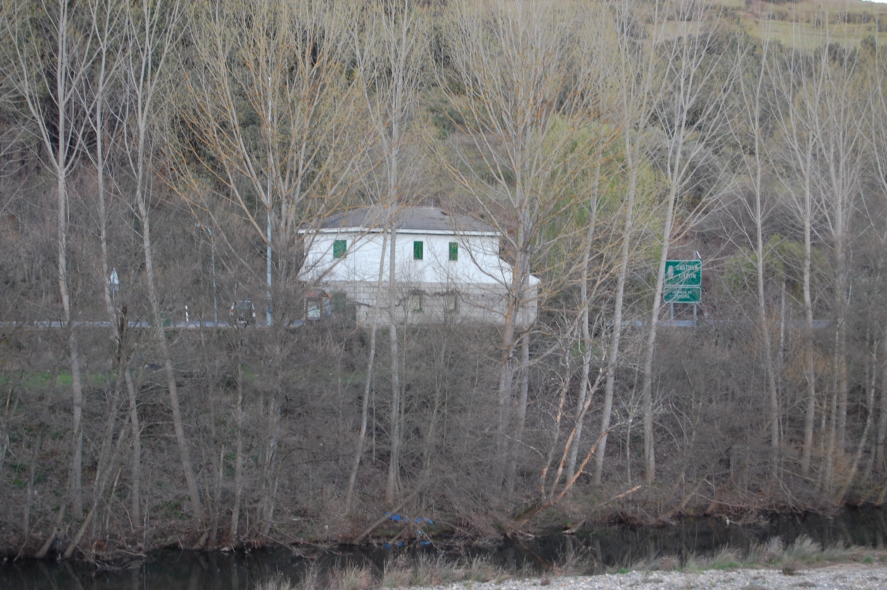 A fronteira entre Portugal (Quintanilha e Espanha (Trabazos.